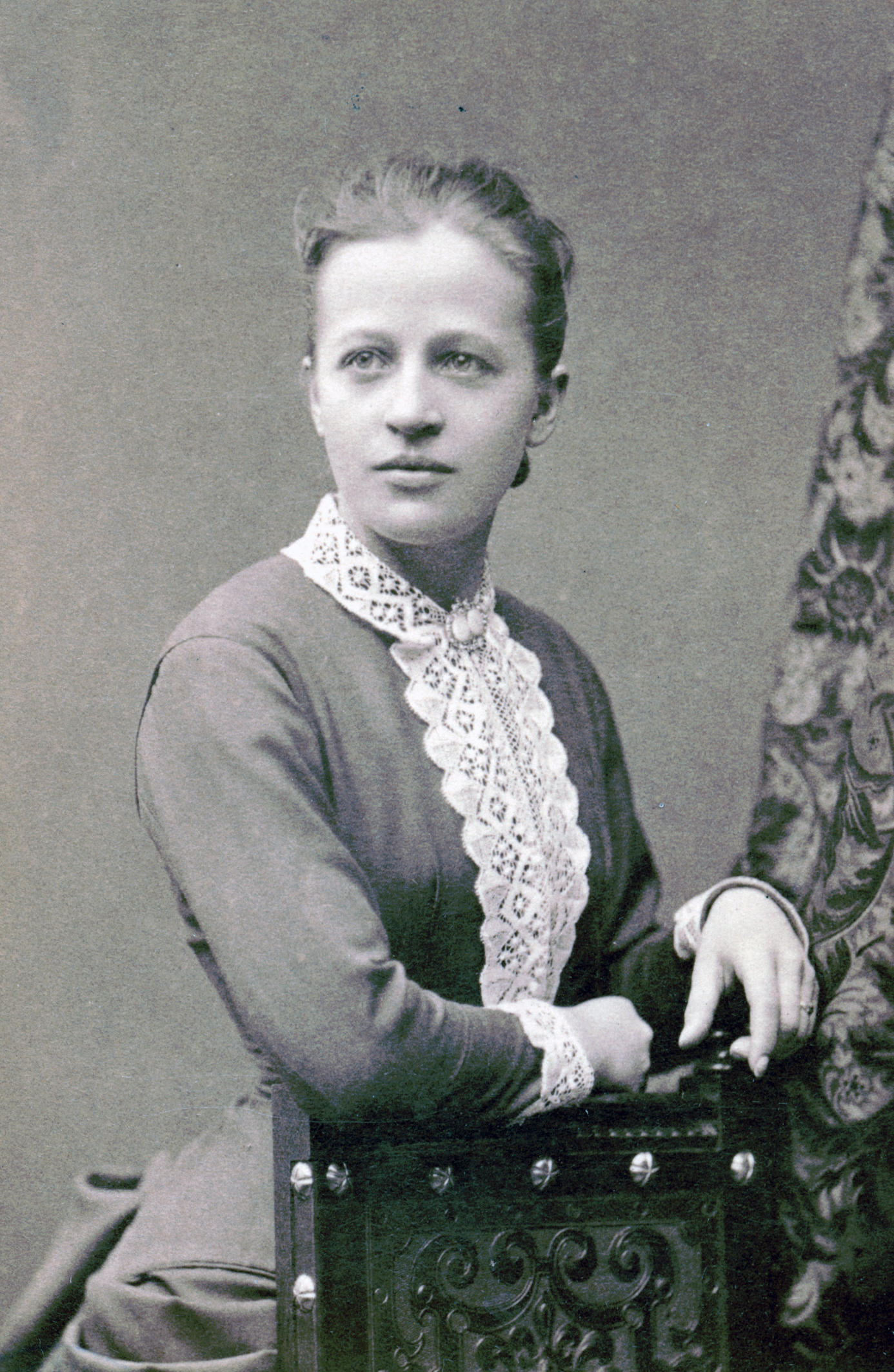 Maria Andersson (gift Hagman), skådespelare vid Nya teatern 1881